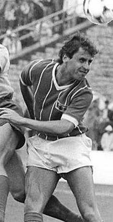 Title: Berlin, FDGB-Pokal, Endspiel, 1. FC Lok Leipzig - 1. FC Union Berlin 5:1 Factual corrections and alternative descriptions are encouraged separately from the original description. Additionally errors can be reported at this page to inform the Bundesarchiv. Original historic description: ADN-ZB-Settnik-31.5.86-zin- Berlin: 35. Endspiel um den FDGB-Fußball-Pokal 1. FC Lok Leipzig - 1. FC Union Berlin 5:1 (1:0)- Der dreifache Torschütze Hans Richter (Leipzig-l.) hat sich im Kopfballduell gegen den Berliner Dirk Koenen (r.) durchgesetzt. Hans Jörg Leitzke (Leipzig-Im Hintergrund) beobachtet die Aktion. Vor 50 000 Zuschauern im Stadion der Weltjugend errangen die Messestädter bei der neunten Finalteilnahme den vierten Pokaltriumph.